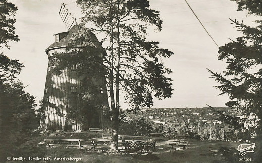 Vykort, Nora väderkvarn på Amerikaberget